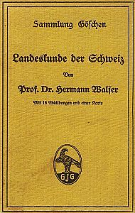 Cover von „Landeskunde der Schweiz“ von Hermann Walser, Göschen 1914